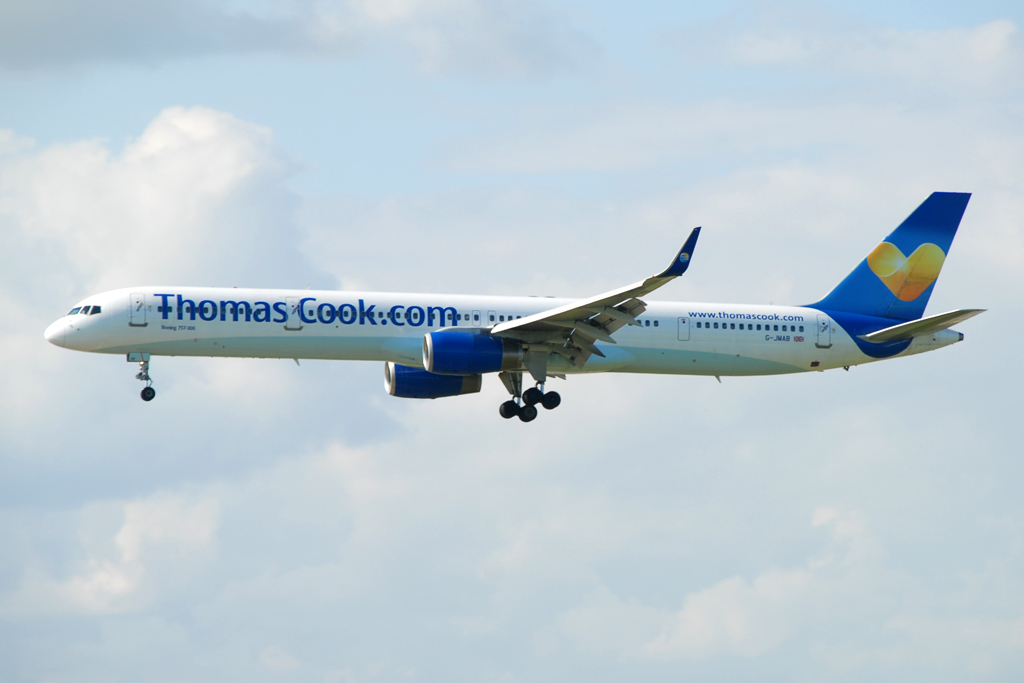 G-JMAB@LGW 05JUN14